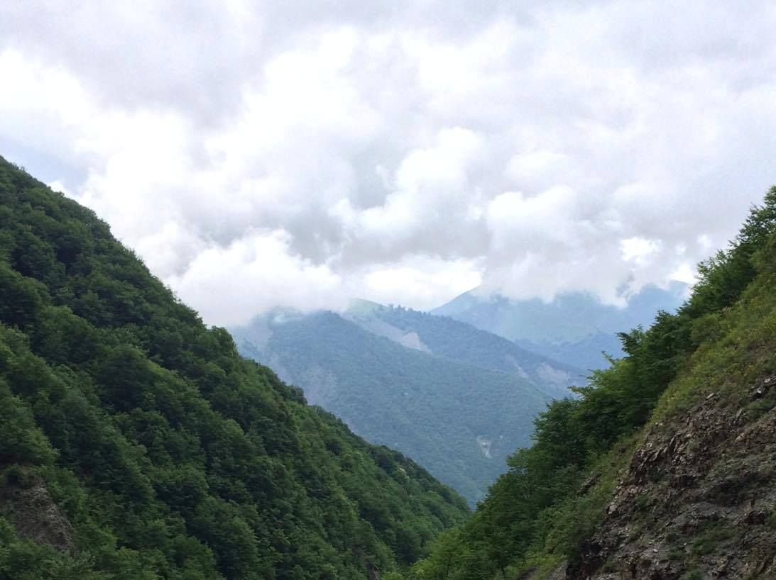 Dağ silsilələri 1